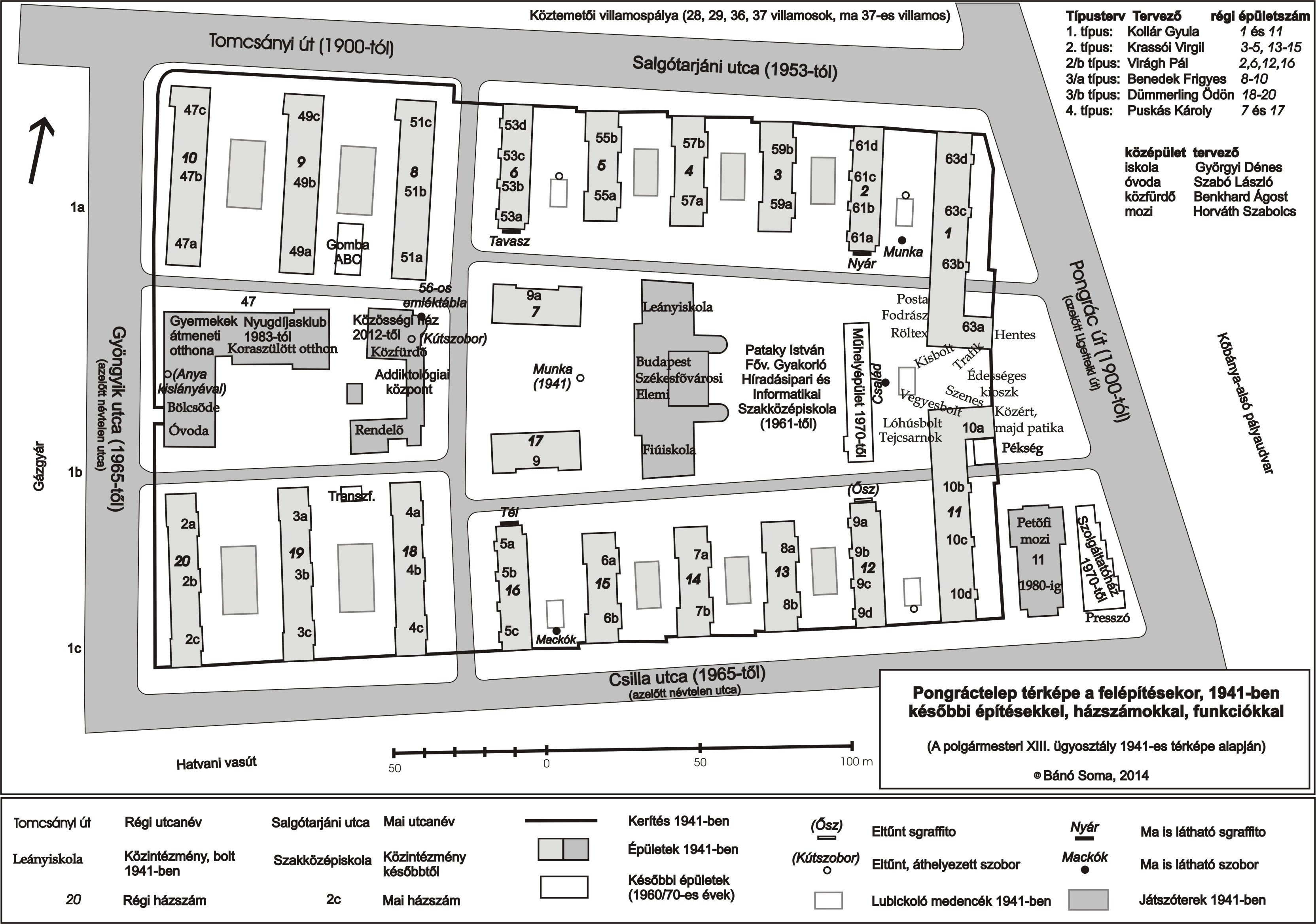 Pongráctelep helytörténeti térképe 1941-1990 közötti állapotok feltüntetésével.